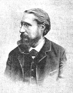 "M. Ch. Gide, né à Uzès (Gard) en 1847 - Phot. J. Grand".